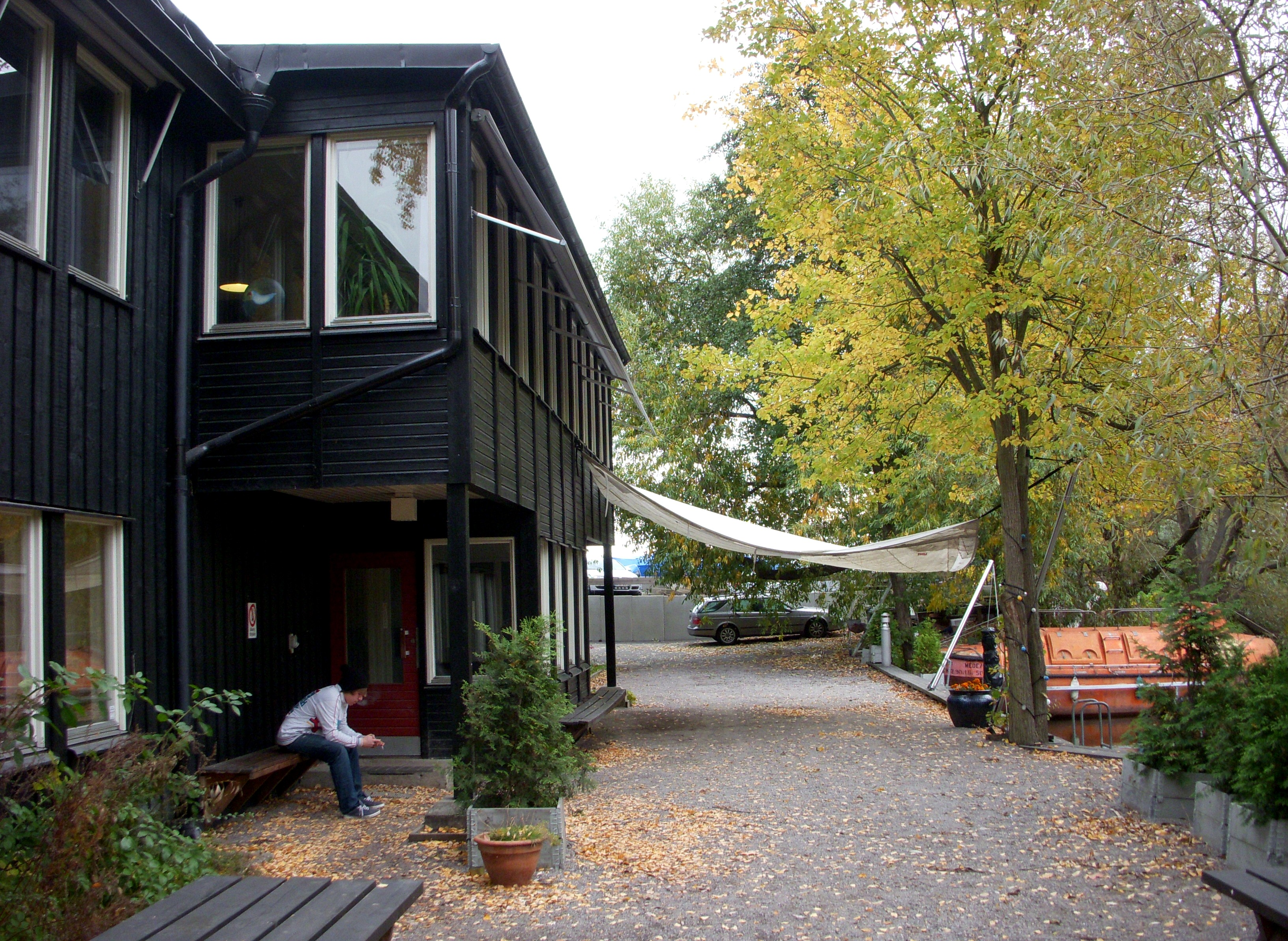 Sjömansskolan på Långholmen, Stockholm